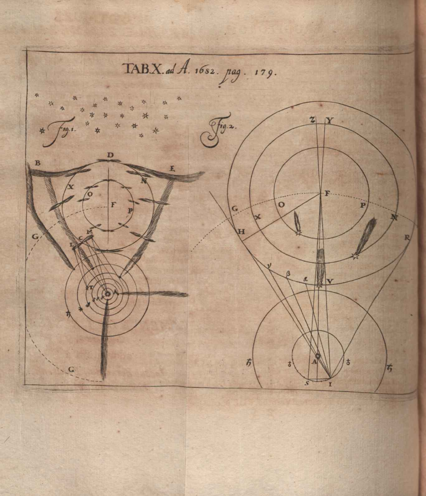 Illustration